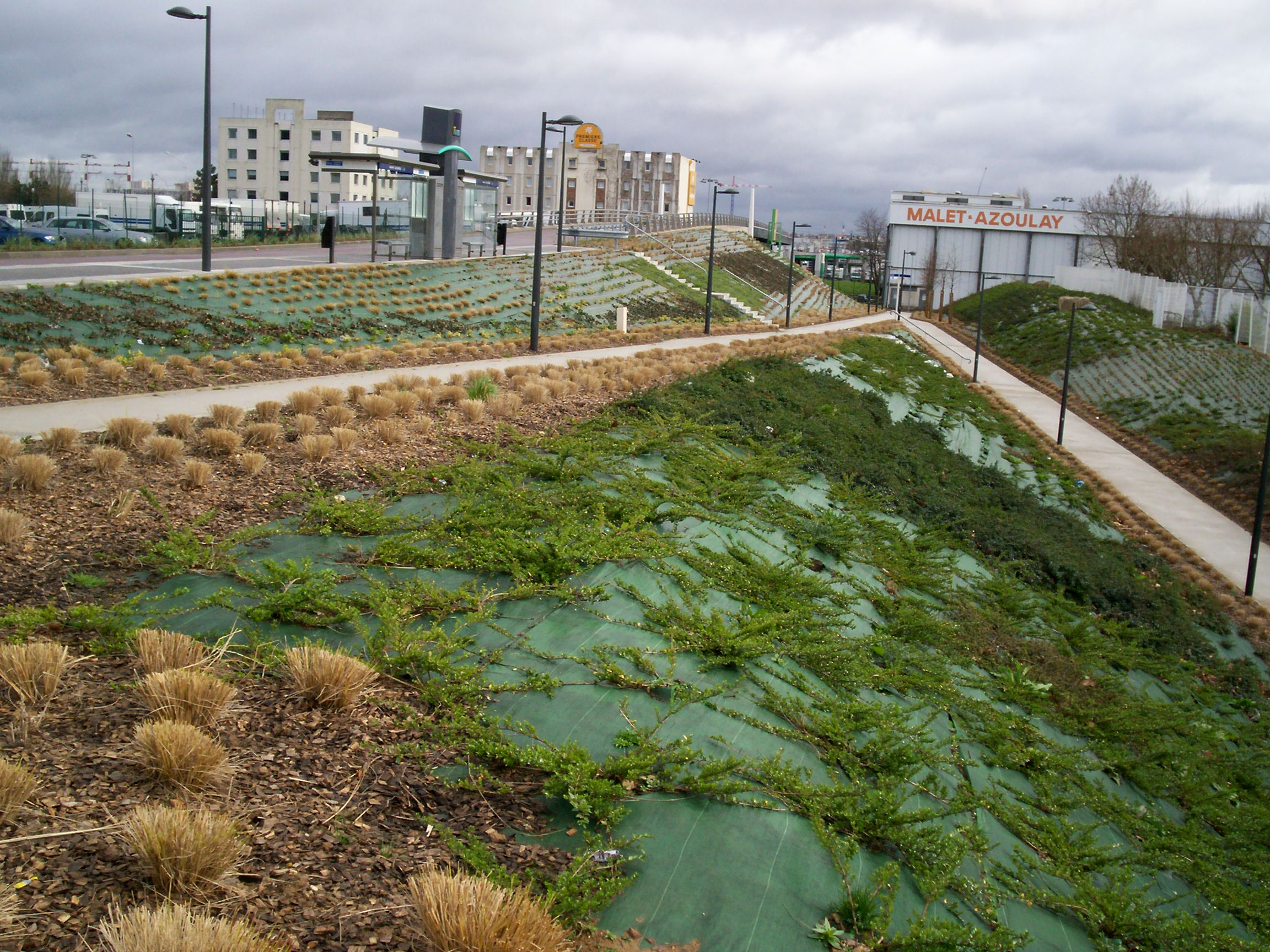 Accès à l'arrêt TVM Le Delta